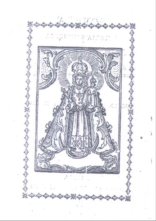 Grabado de Nuestra Señora de Loreto, Algezares (Murcia) Spain, año 1796